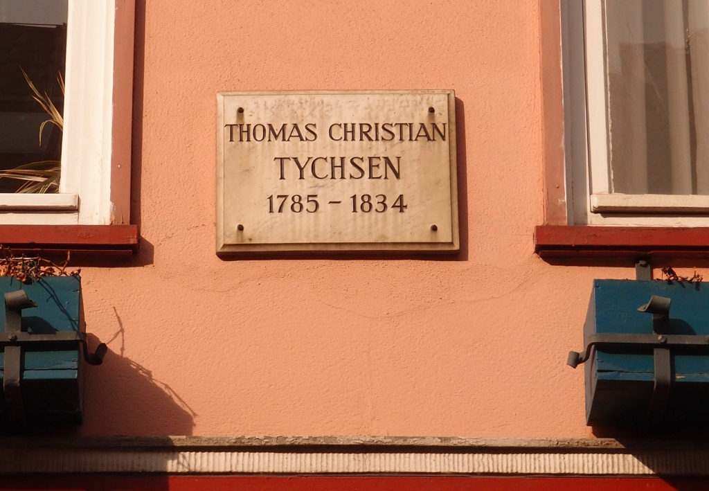 Gedenktafel für den Orientalisten Thomas Christian Tychsen in Göttingen, Gotmarstraße 3 (richtiges Geburtsjahr: 1758)